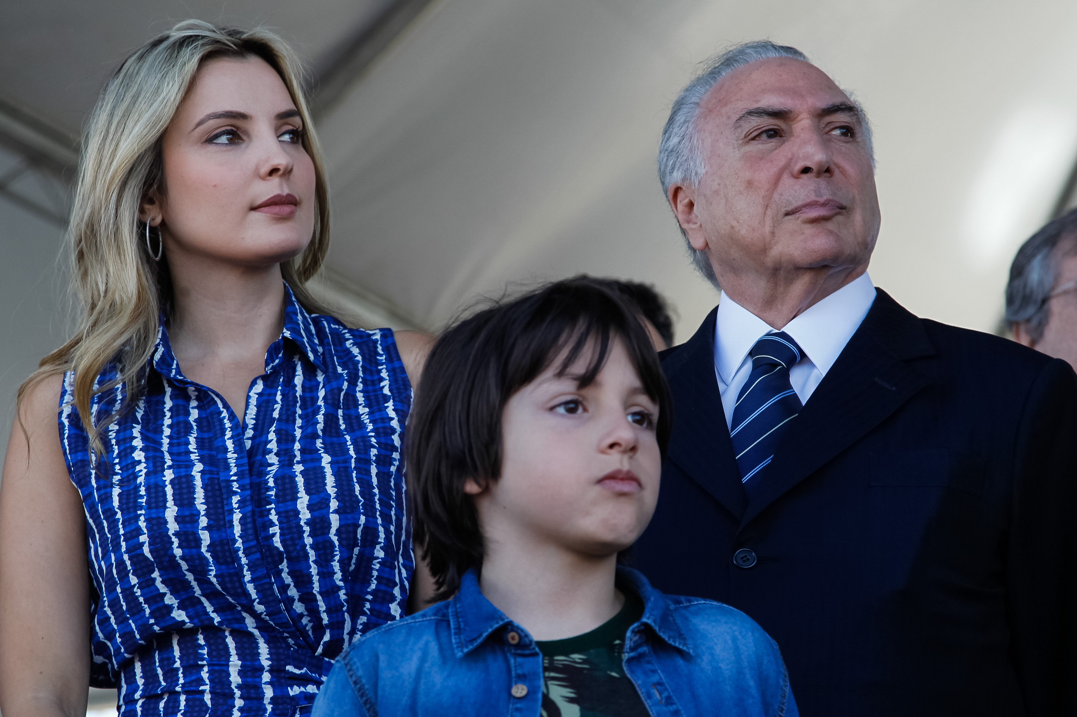 (Brasília - DF, 07/092017) Desfile cívico de 7 de Setembro. Foto: Beto Barata/PR